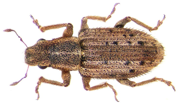 Familie: Curculionidae Grösse: 3-4,5 mm Verbreitung: Europa Ökologie: an Trifolium-, Vicia-, Medicago-Arten, Pisum sativum, Phaseolus vulgaris und Lens esculenta Fundort: Germania, Bayern, Oberfranken, Selbitz leg.det. U.Schmidt, 2004 Foto: U.Schmidt, 2006